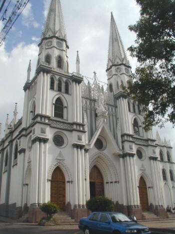 la segunda iglesia principal